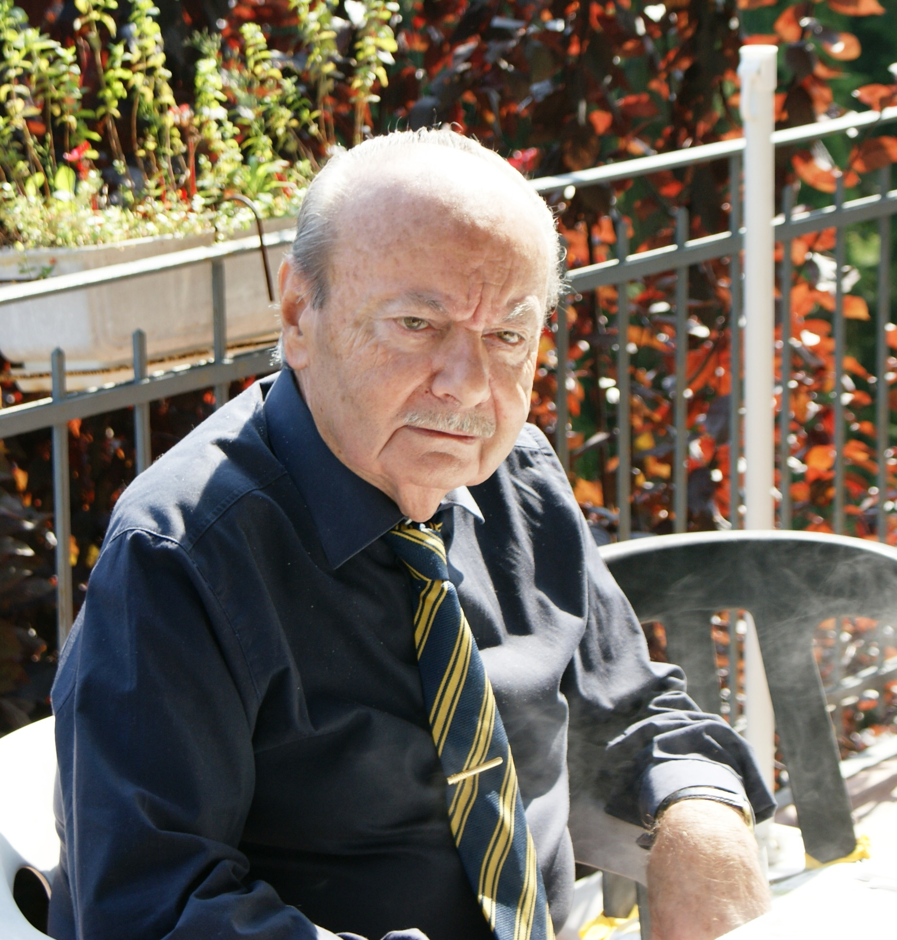 Balcone della casa dello scrittore a Neive